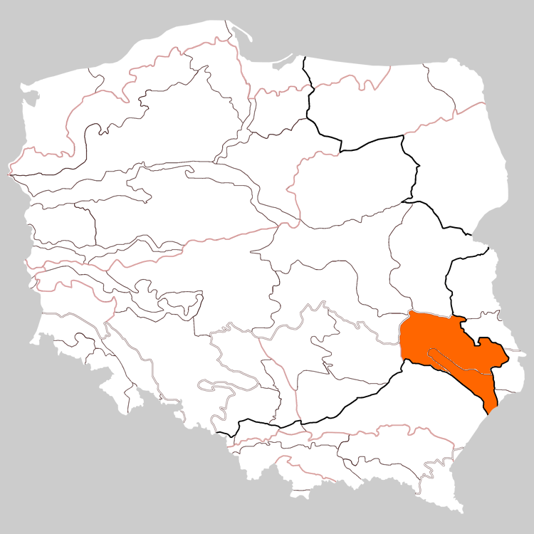 Wyżyna Lubelsk-Lwowska